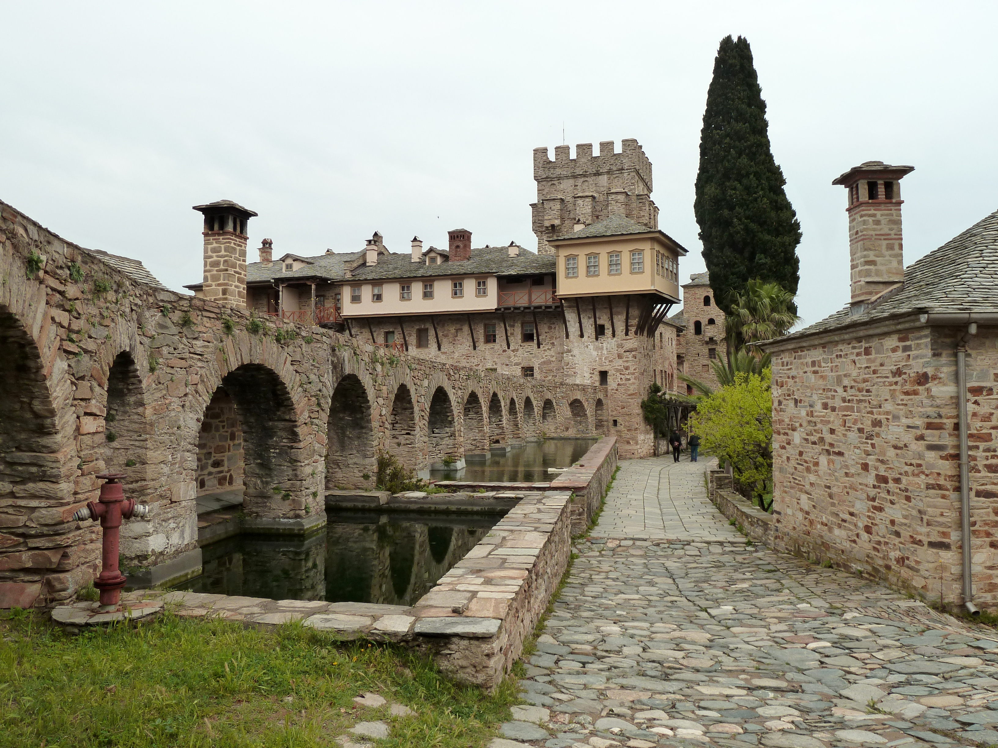 Entrée et aqueduc du monastère Stavronikita (Mont Athos)